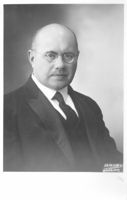 Johannes Piiper